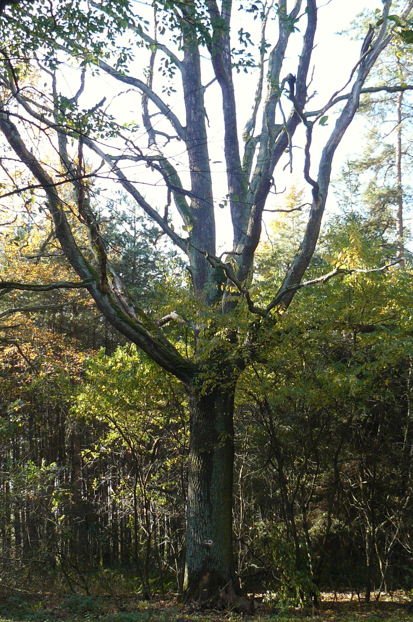 Obszar Chronionego Krajobrazu Dąbrowy Krotoszyńskie i Baszków-Rochy - krajobrazy leśne kompleksu Baszków-Rochy.